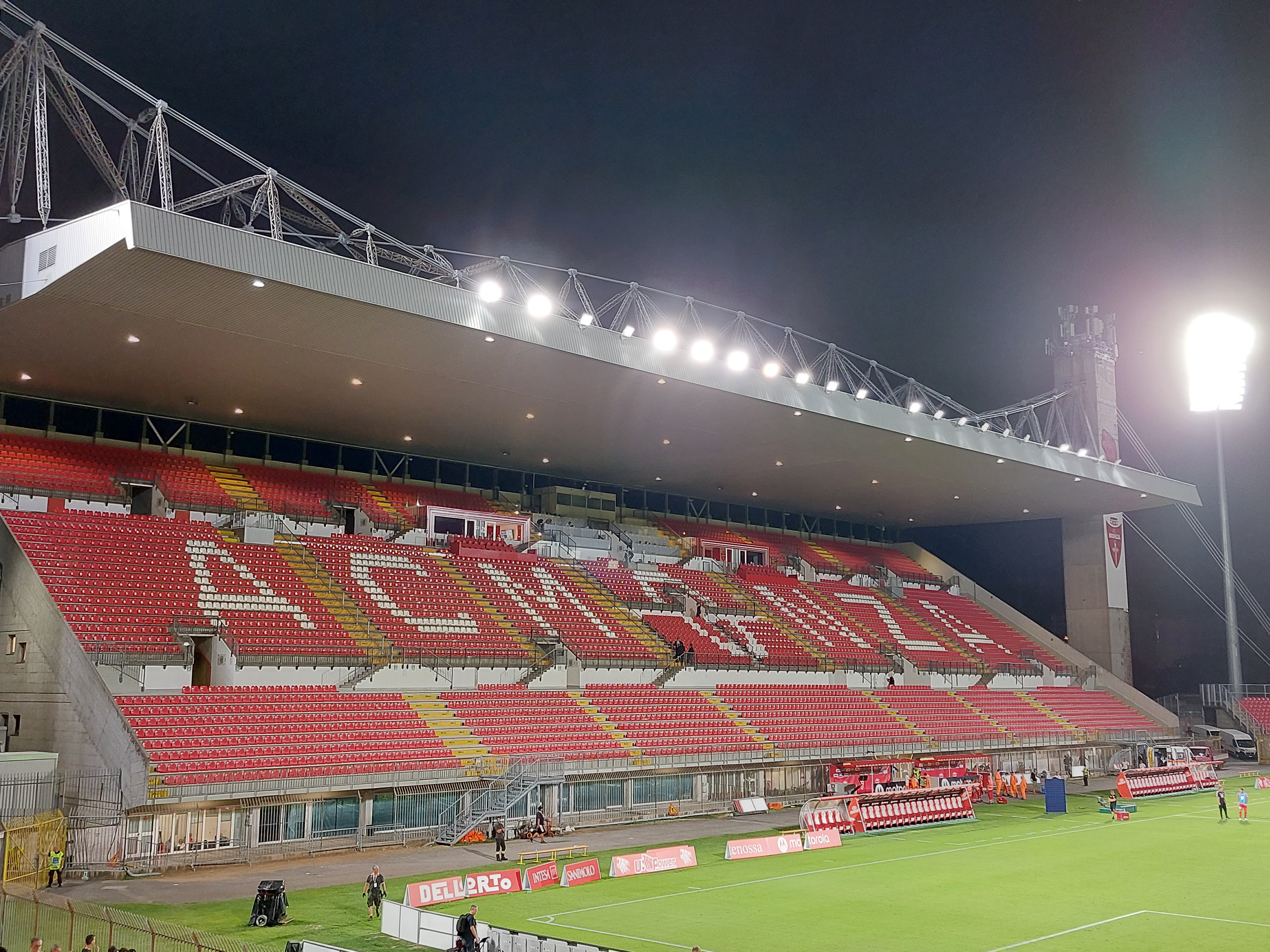 Nuova scritta Stadio Brianteo